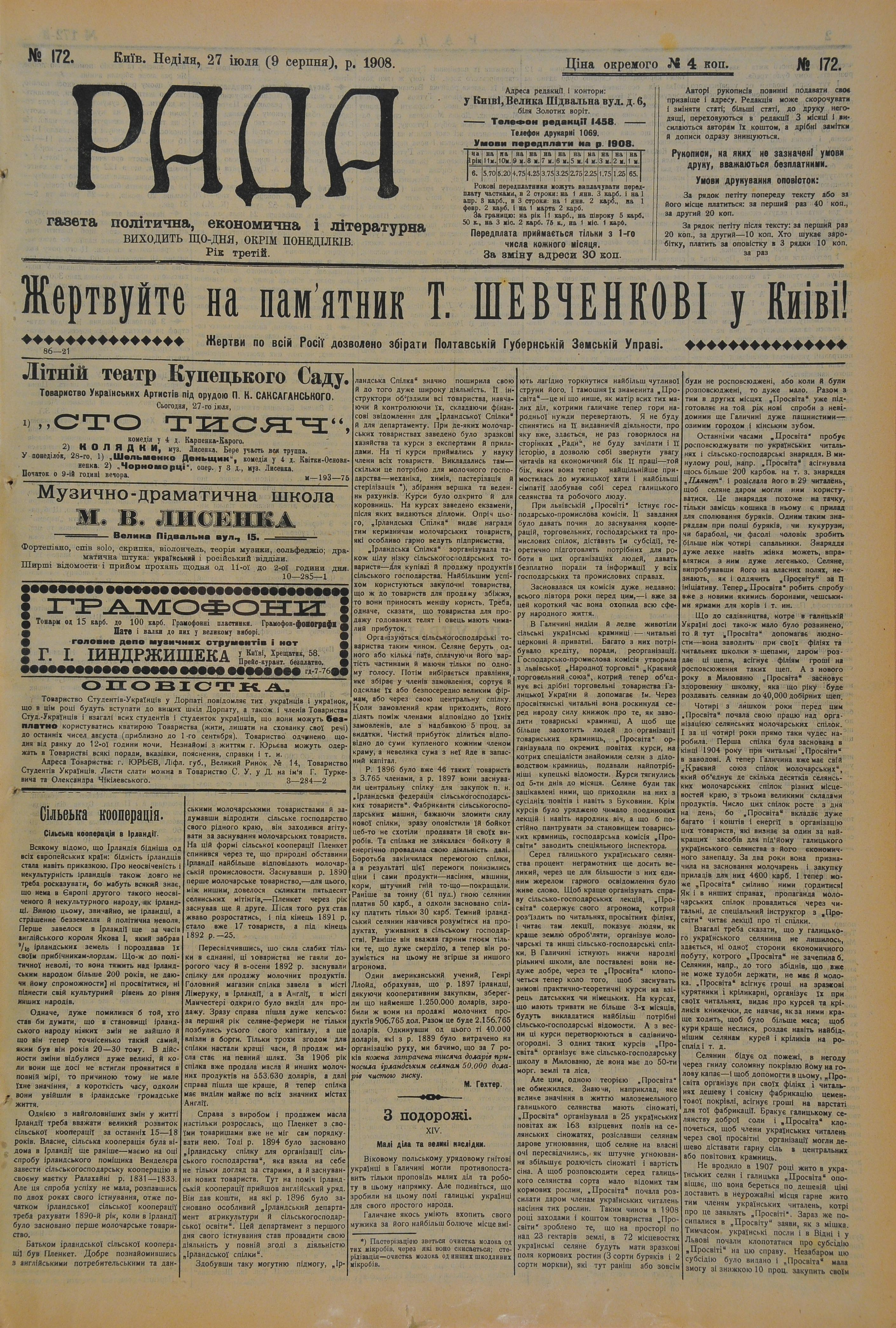 Перша сторінка газети «Рада» (1908. – 27 липня(9 серпня).)